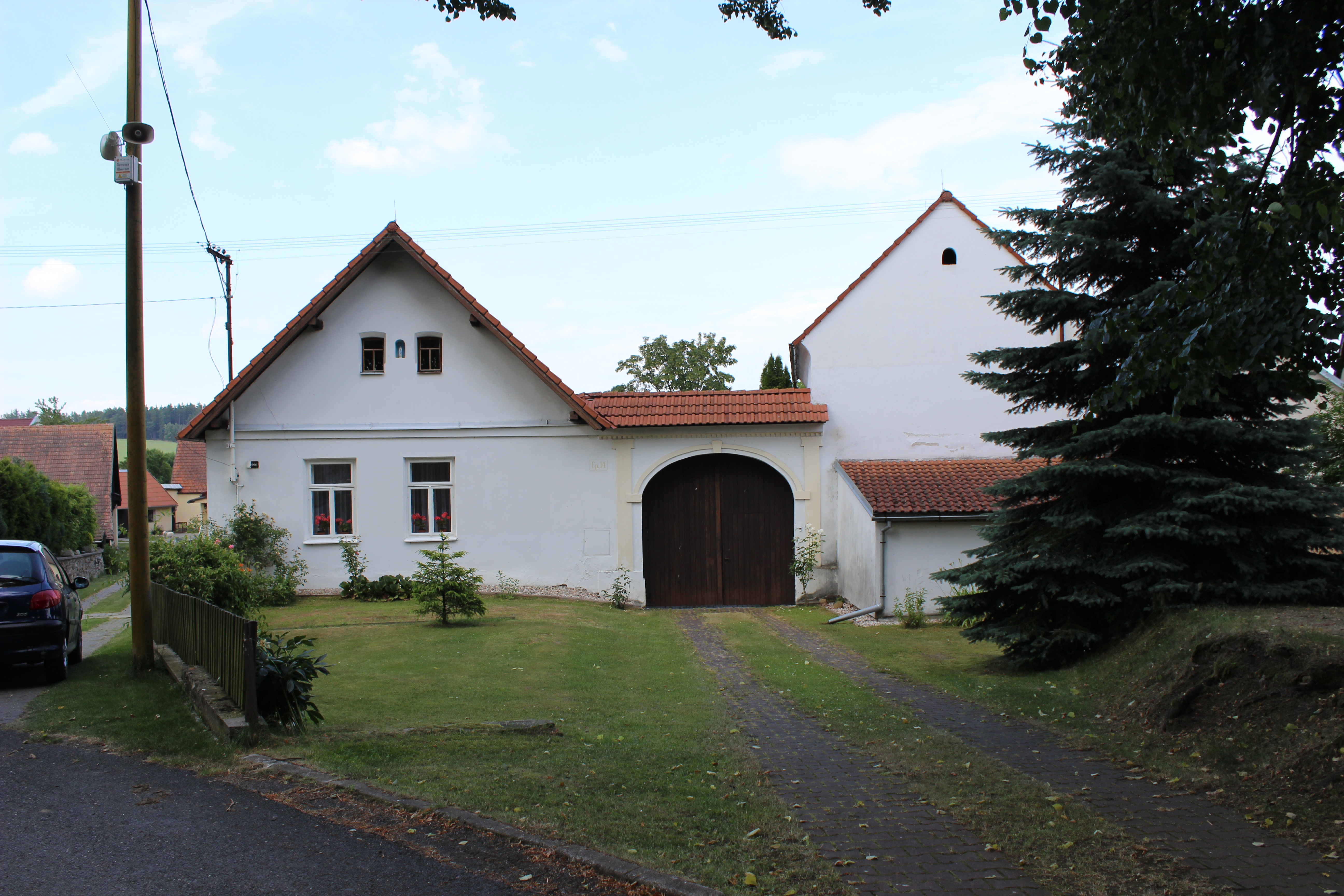 Dům číslo popisné 14 v Keblově.